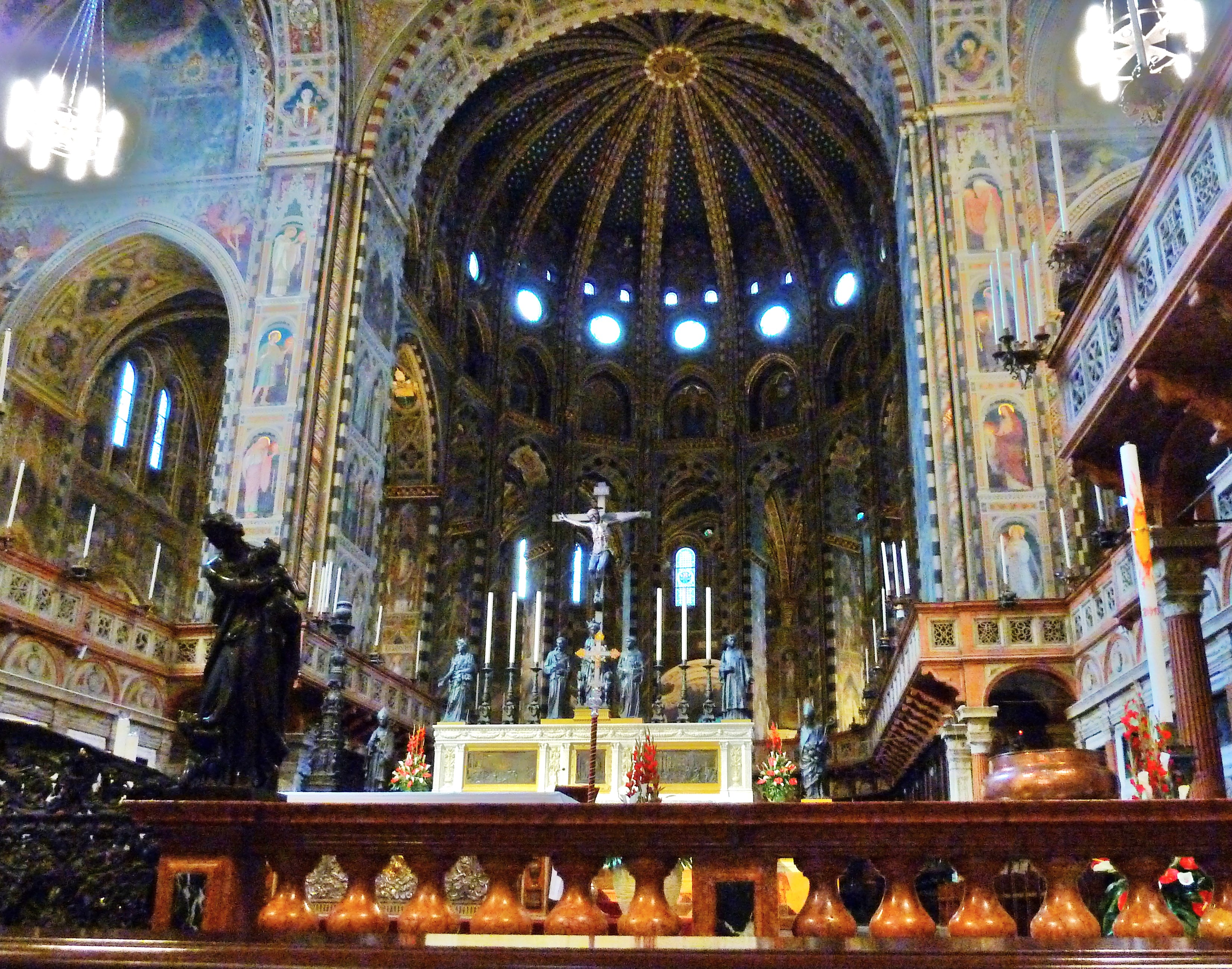 Padua, Basilika des hl. Antonius. Blick ins Presbyterium mit dem Hochaltar